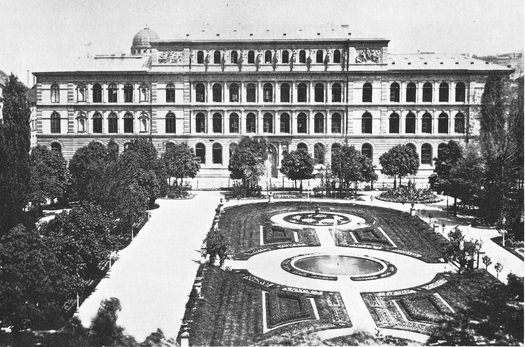 Alexander von Tritschler: Hauptfassade des Erweiterungsbaus des Polytechnikums in Stuttgart, Baujahr 1876.